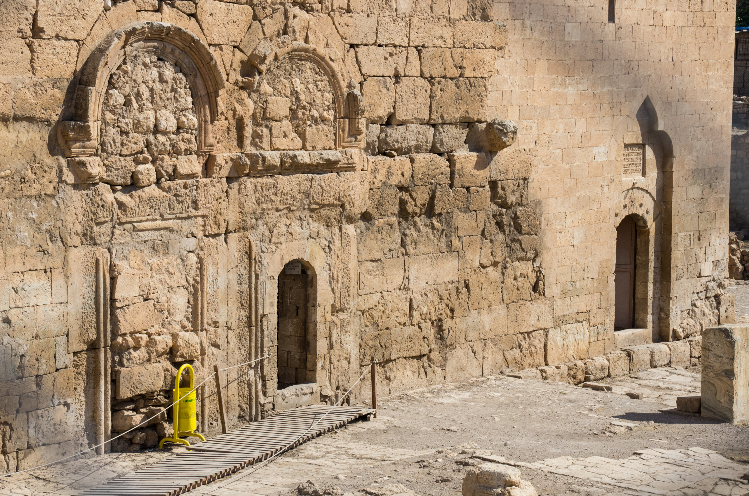 Die Kirche des Jakob von Nisibis in Nusaybin.